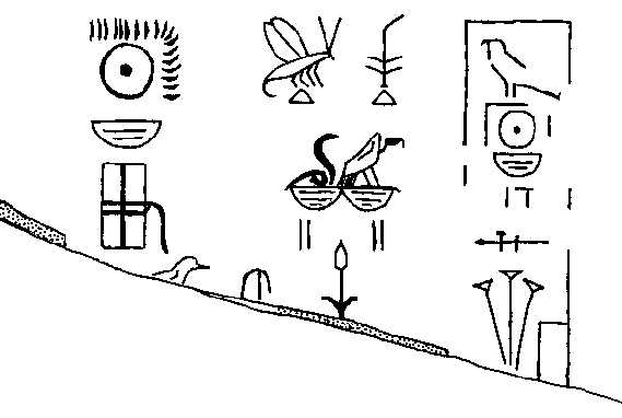 Ninetjer-auf-Rasur3